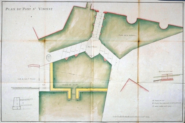 Fonds de l'intendance. Plan du pont Saint-Vincent à Vannes. Dessin : plan, 18e siècle. AD Ille-et-Vilaine C 704/02.